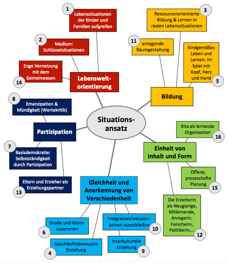 Dimensionen und konzeptionelle Grundsaetze des didaktischen Ansatzes Situationsansatz; Sozialpaedagogik; Paedagogik der fruehen Kindheit